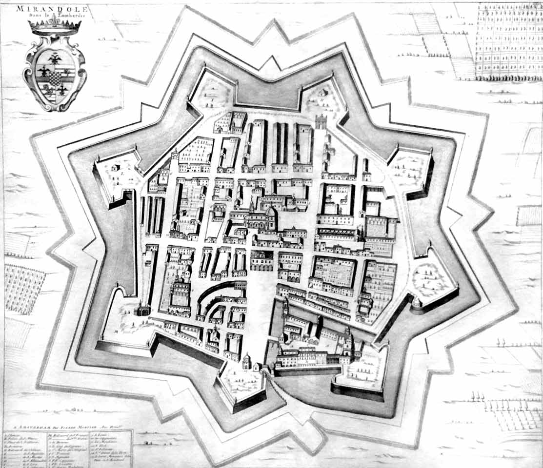 Vista di Mirandola in un'incisione di Pier Mortier pubblicata in Nouveau Theatre de l’Italie (Amsterdam, 1704)